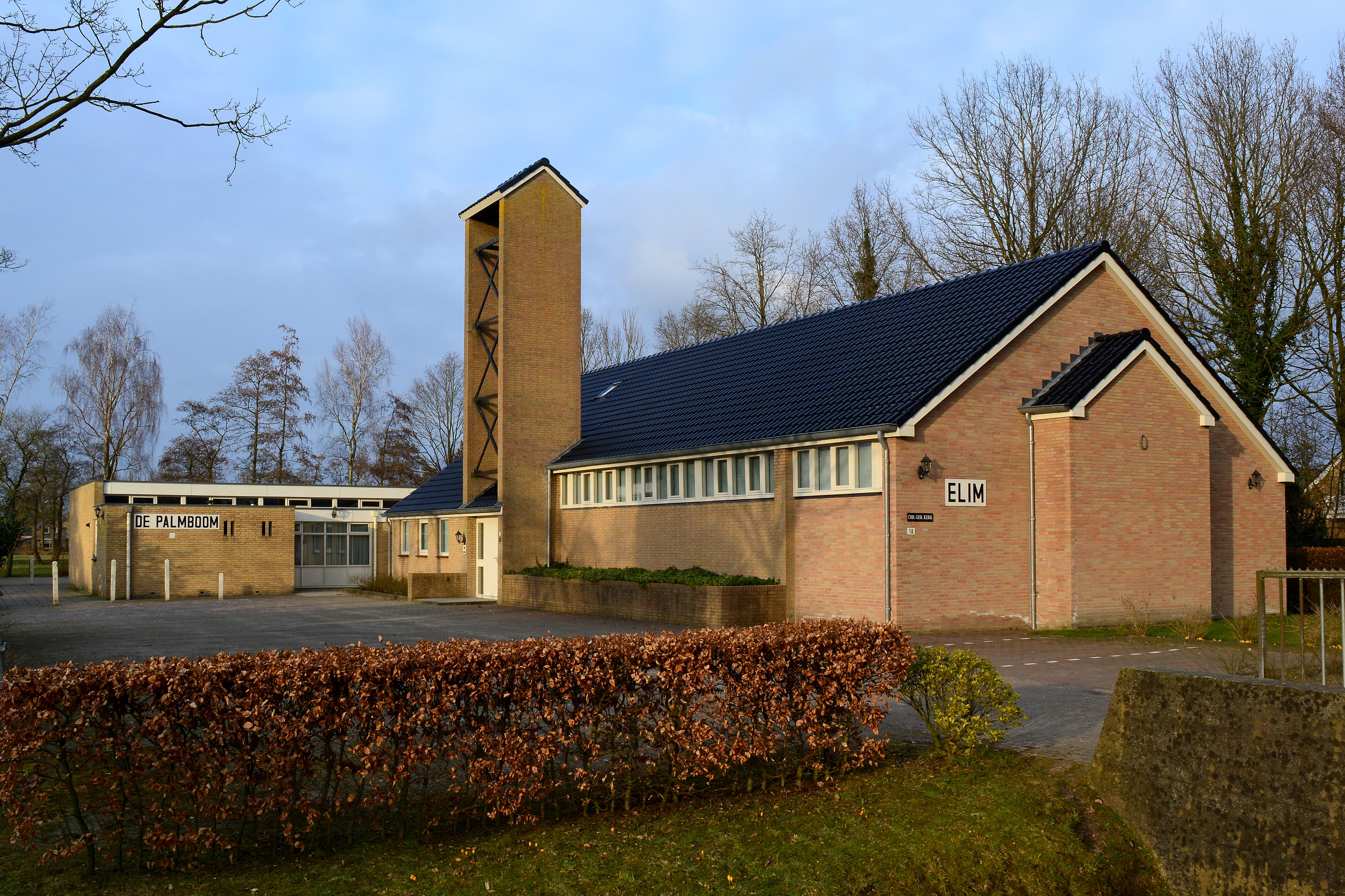 Kristlik-Grifformearde tsjerke Sigerswâld-De Wylp